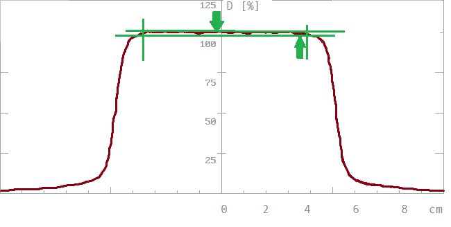 Strahlentherapie Querprofil eines Bestrahlungsfeldes mitEinzeichnung zur Bewertung der Homogenität; Dmax, Dmin; ausgeglichener Bereich 80% der Feldgröße